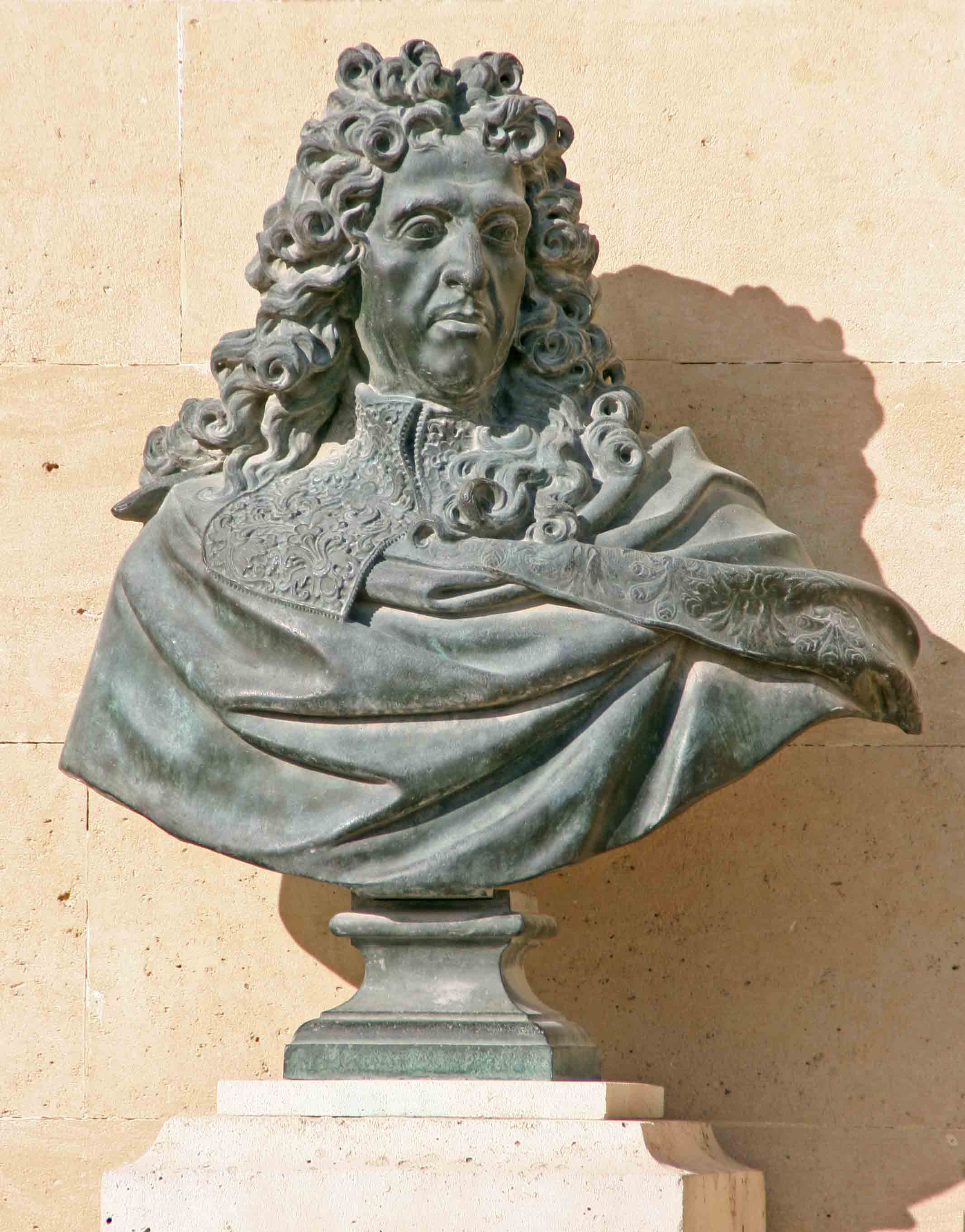 André Le Nôtre-Buste zu Paräis.